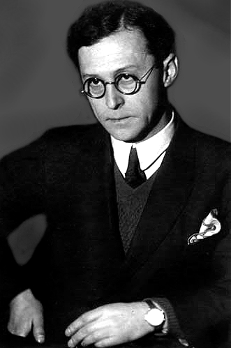 Артист Малого театра Александр Иванович Сашин-Никольский